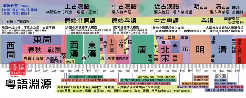 粵語: 粵語淵源